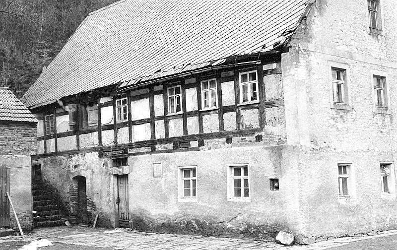 Original image description from the Deutsche FotothekTriebischtal-Tanneberg. Eulenmühle